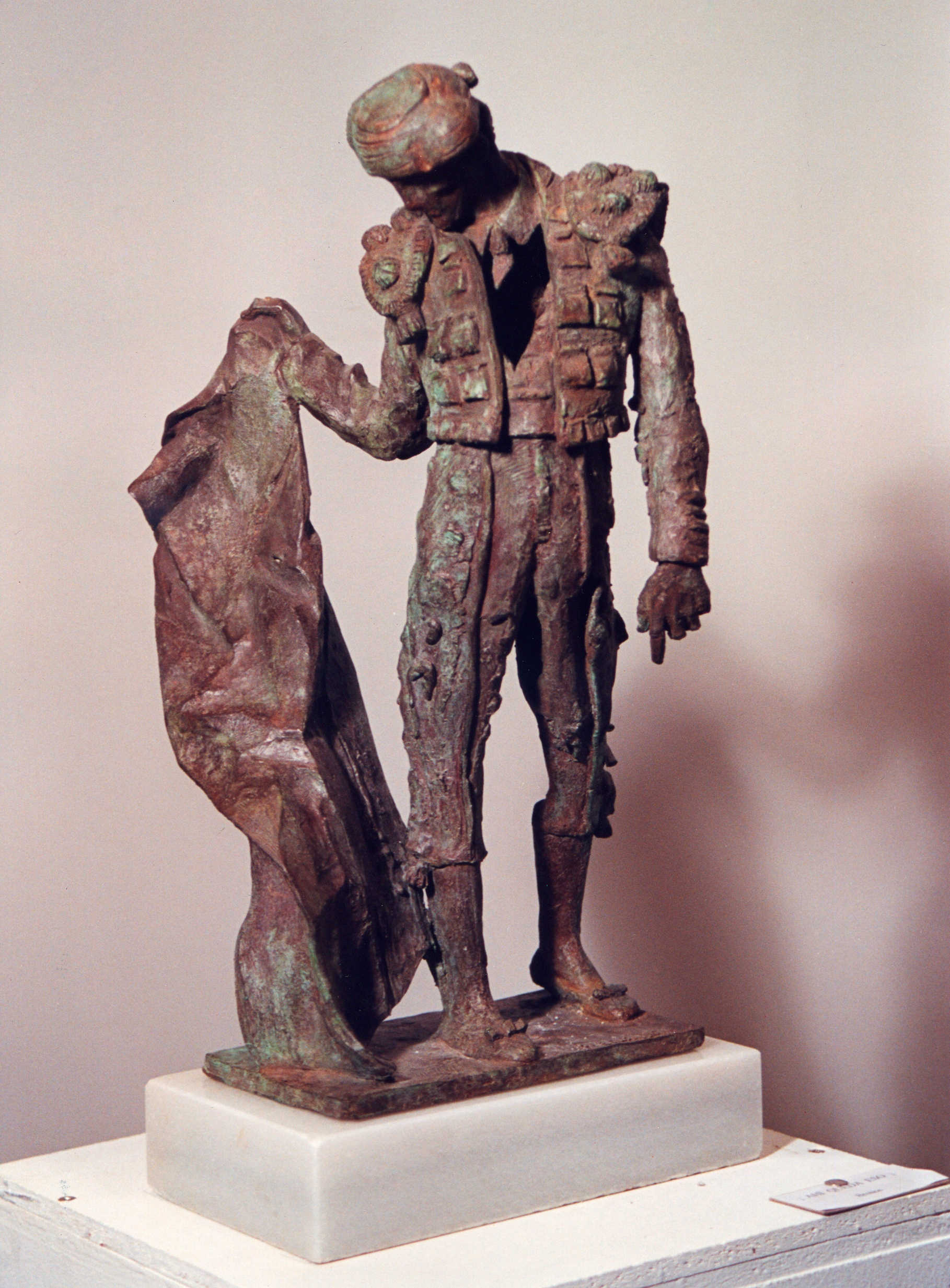 "Ahí queda eso", Rafael Pi Belda. Tamaño: 50cm de alto. Material: bronce. Colección particular.